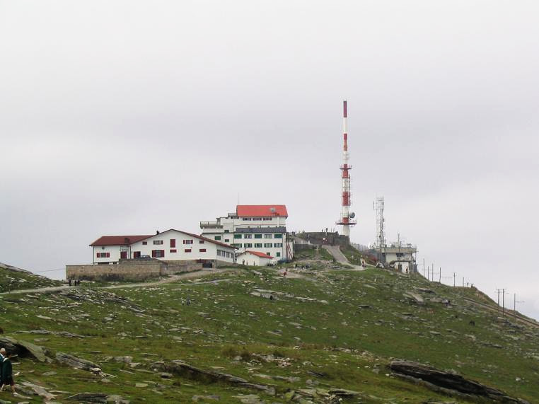 Photographie personnelle de La Rhune (été 2004). Copyright © Kuxu.